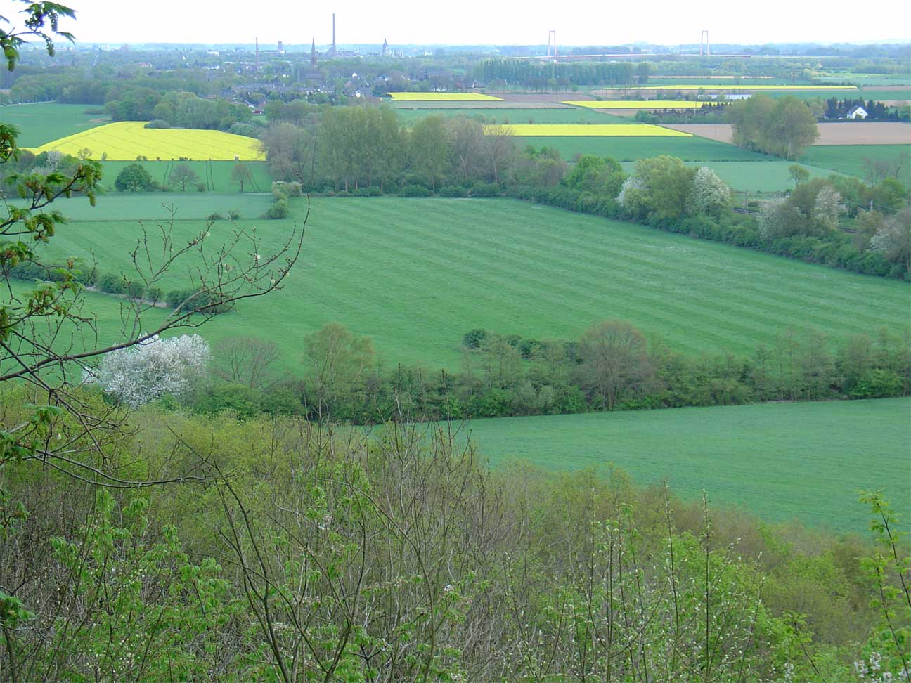 Uitzicht van de Elterberg op het Rijndal met Emmerich